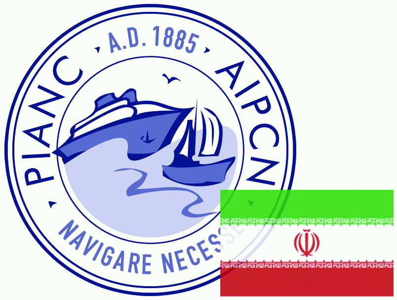 لوگوی پیانک ایران